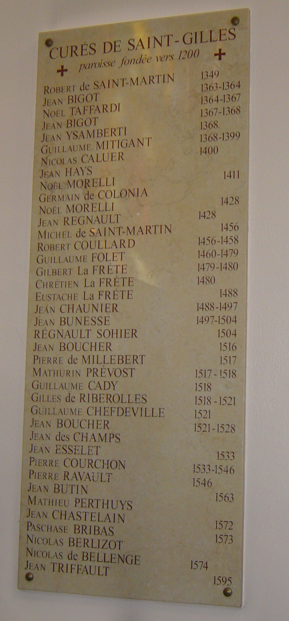 Photos prises à Bourg-la-Reine, commune française des Hauts-de-Seine